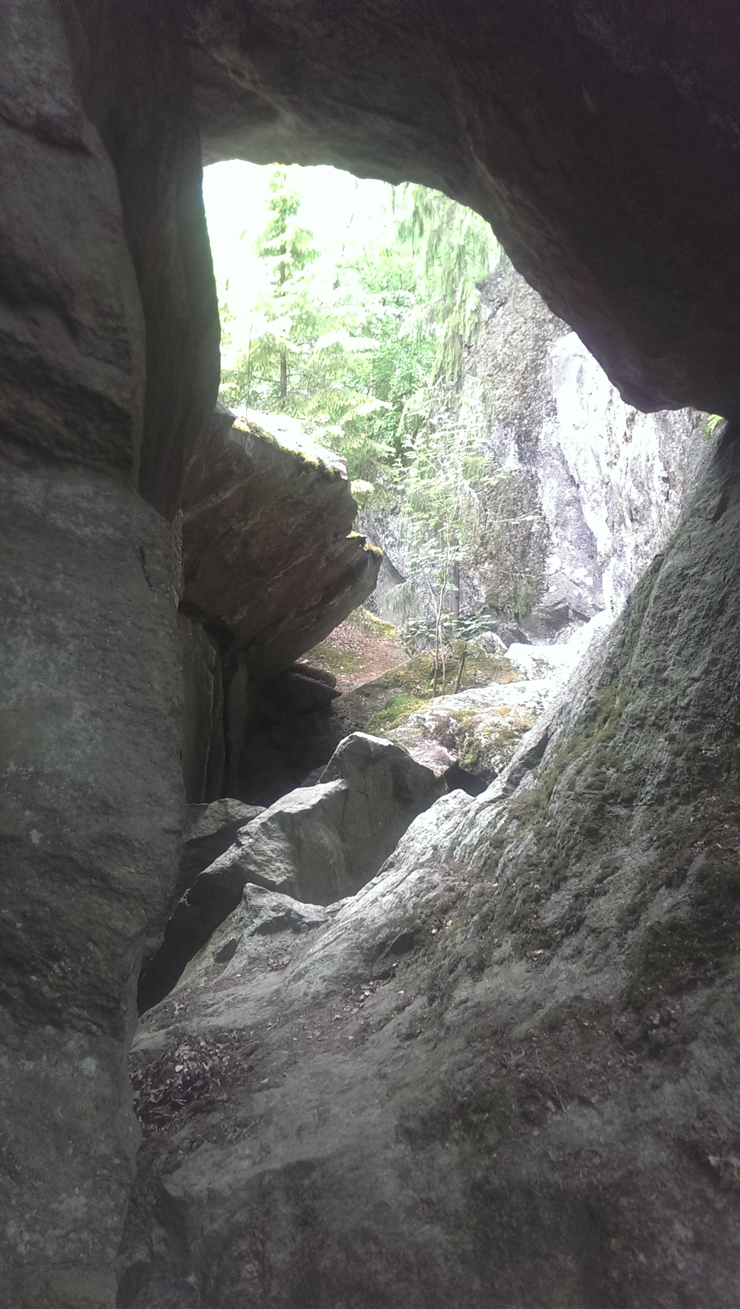 Yksi holvimainen luola Pirunpesässä Porissa